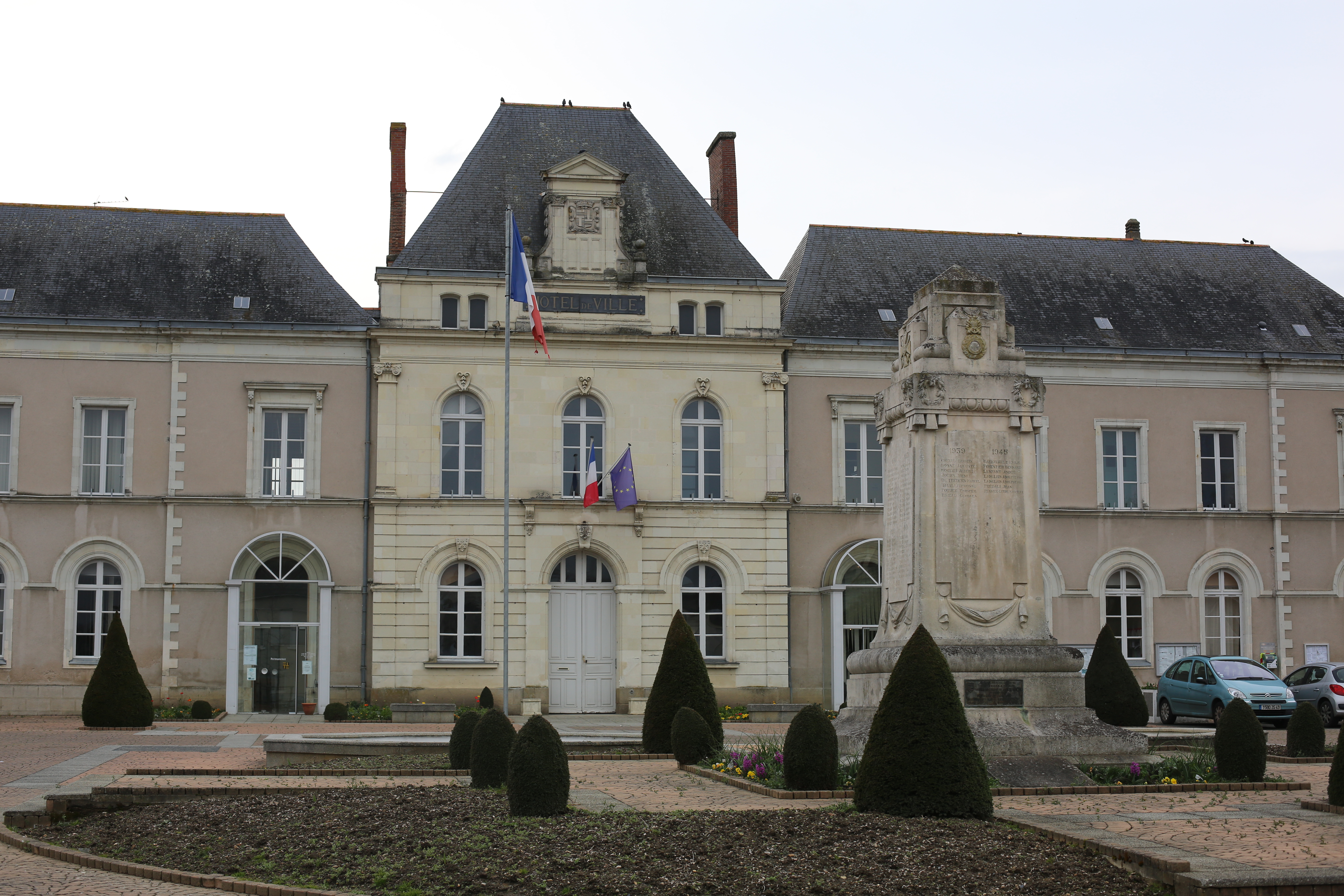 Hôtel de ville et monument aux morts du Lion-d'Angers.